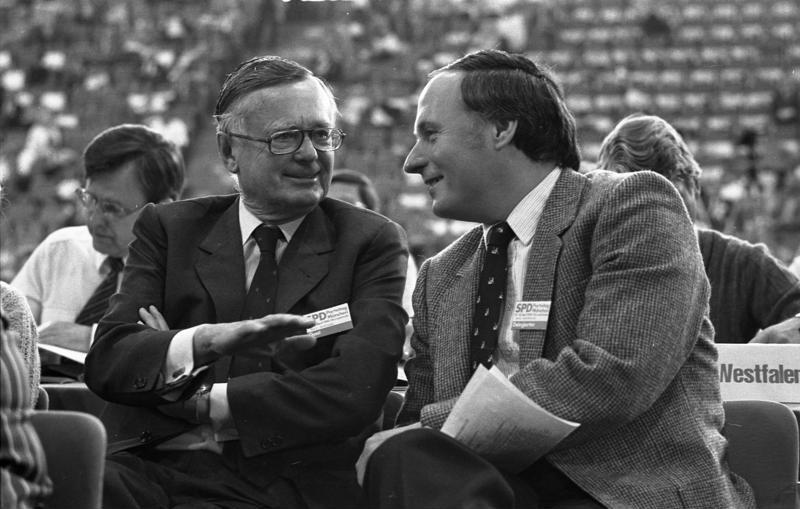 SPD-Parteitag in der Olympiahalle in München